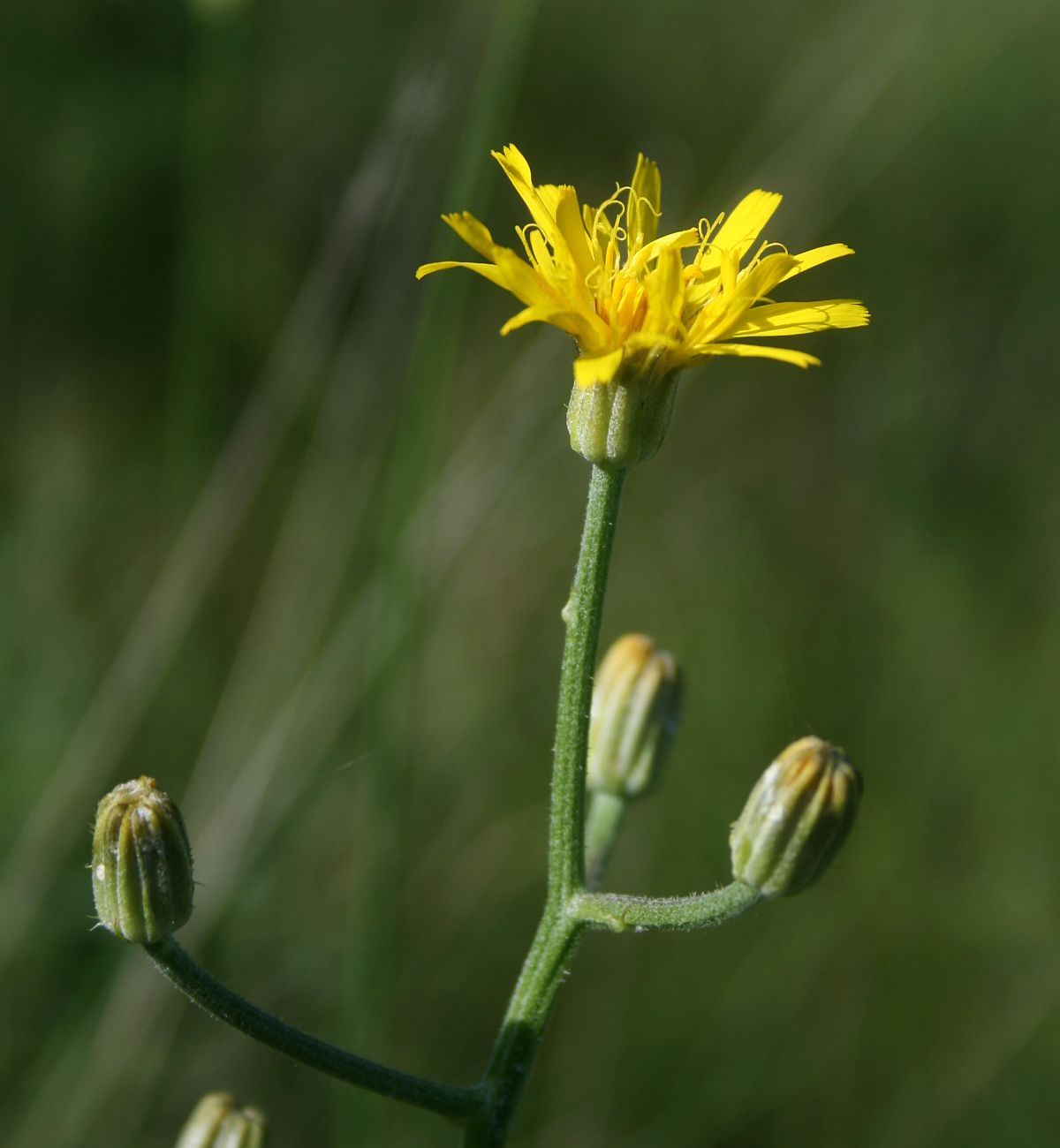 Fenchelblättriger Pippau (Crepis chondrilloides), Korbblütler (Asteraceae) - Slowenien/Slovenija/Slovenia: Primorska, N Podgorje